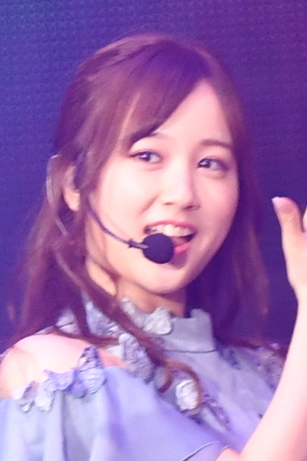 2019.01.26「第14回 KKBOX MUSIC AWARDS in Taiwan」乃木坂46 @台北小巨蛋